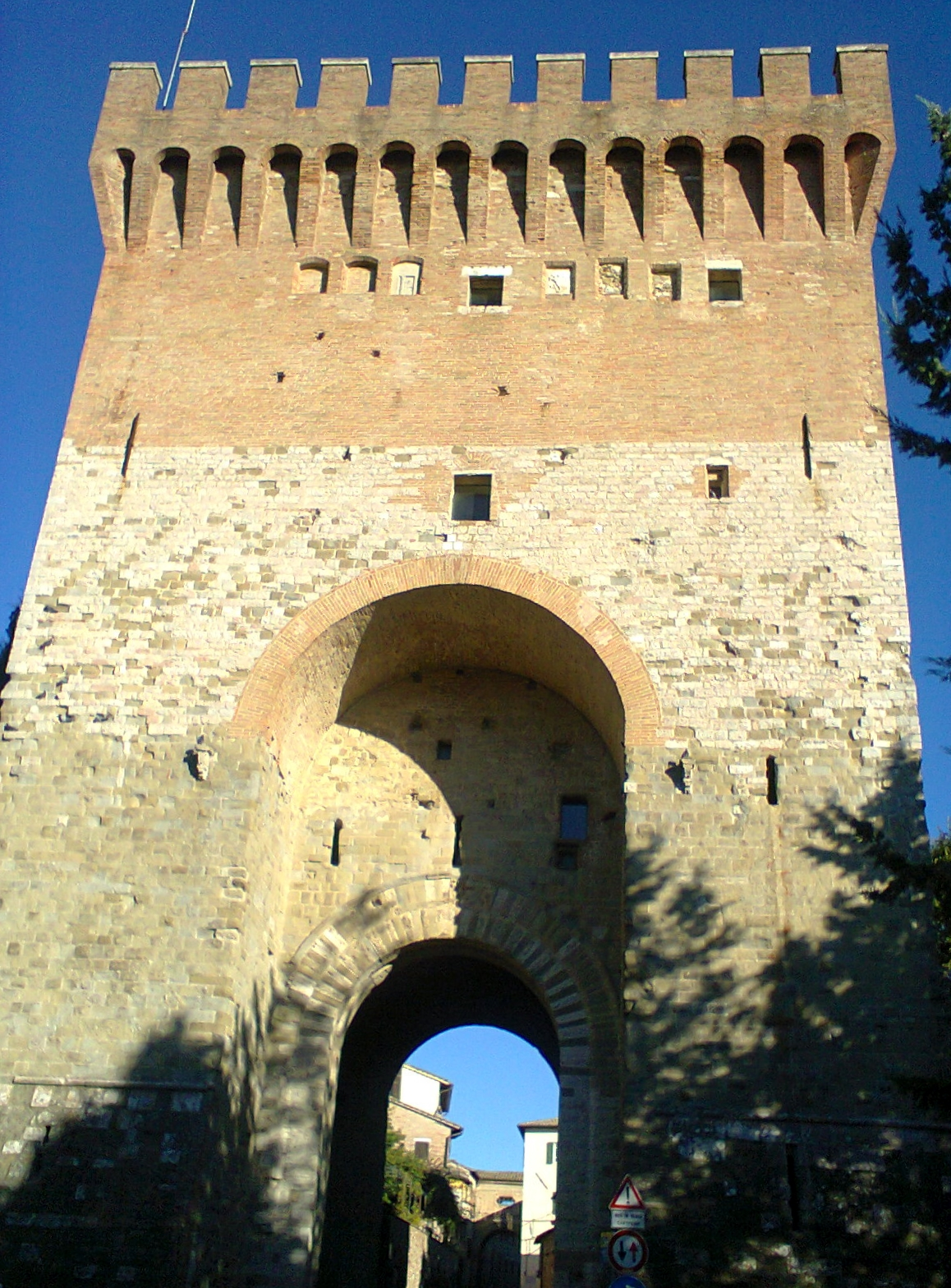 Cassero di Porta Sant'Angelo This is a photo of a monument which is part of cultural heritage of Italy.